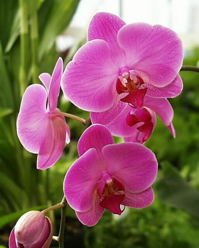 زهرة الأوركيد